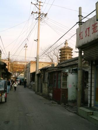 砖塔胡同 拍摄